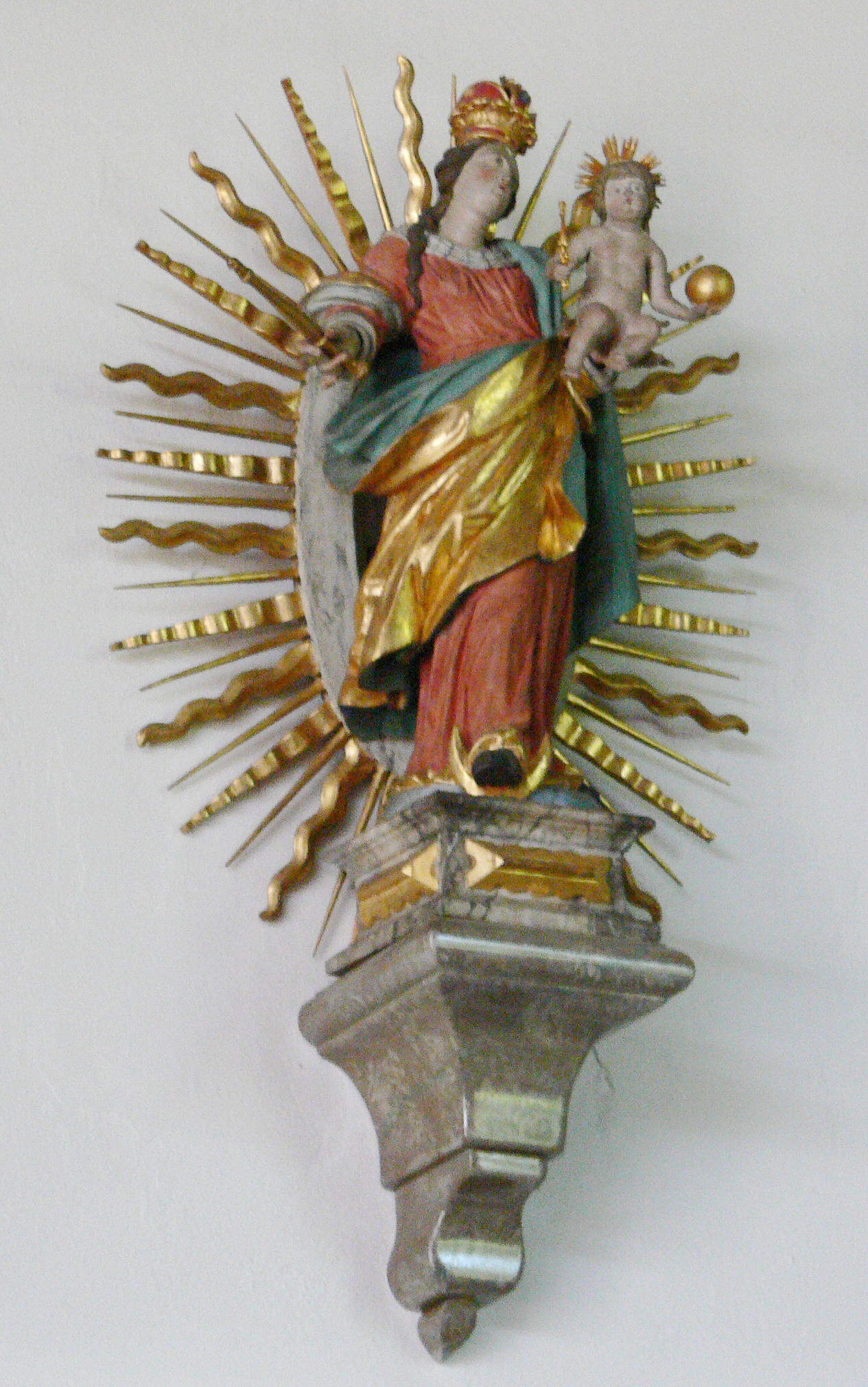 Pfarrkirche St. Jakobus, Brochenzell, Gemeinde Meckenbeuren, Bodenseekreis Barocke Stahlenkranzmadonna